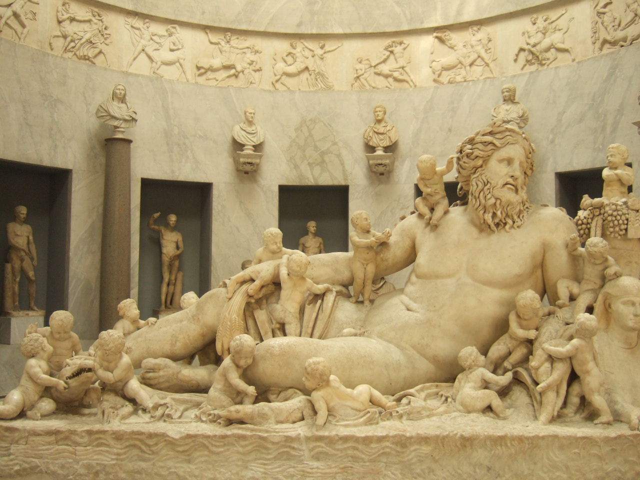 Nil - Vatikanisches Museum Rom